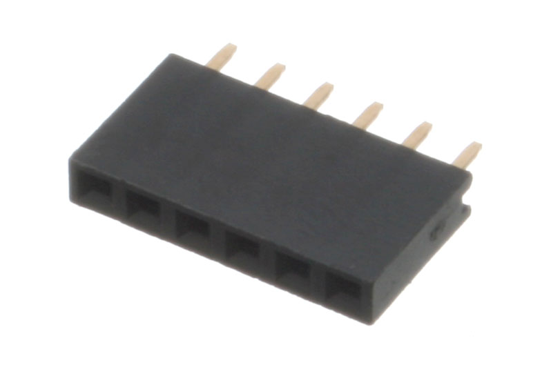 6 Pin Female Header.